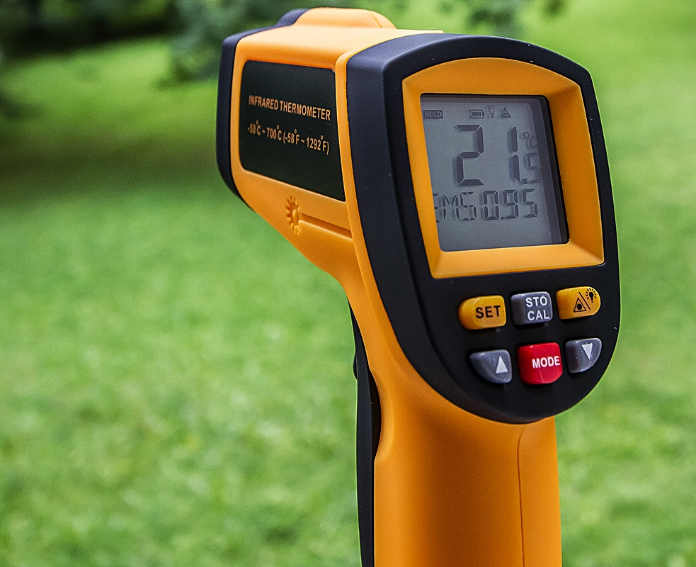 Digital Thermodetector GM700 (Infrared thermometer): Pyrometer (Bolometer) zur berührungslosen Temperaturmessung im Intervall -50°C bis +700°C. Gemessen wird die Temperatur der Infrarotstrahlung, die eine mit dem Gerät angepeilte Oberfläche emittiert.